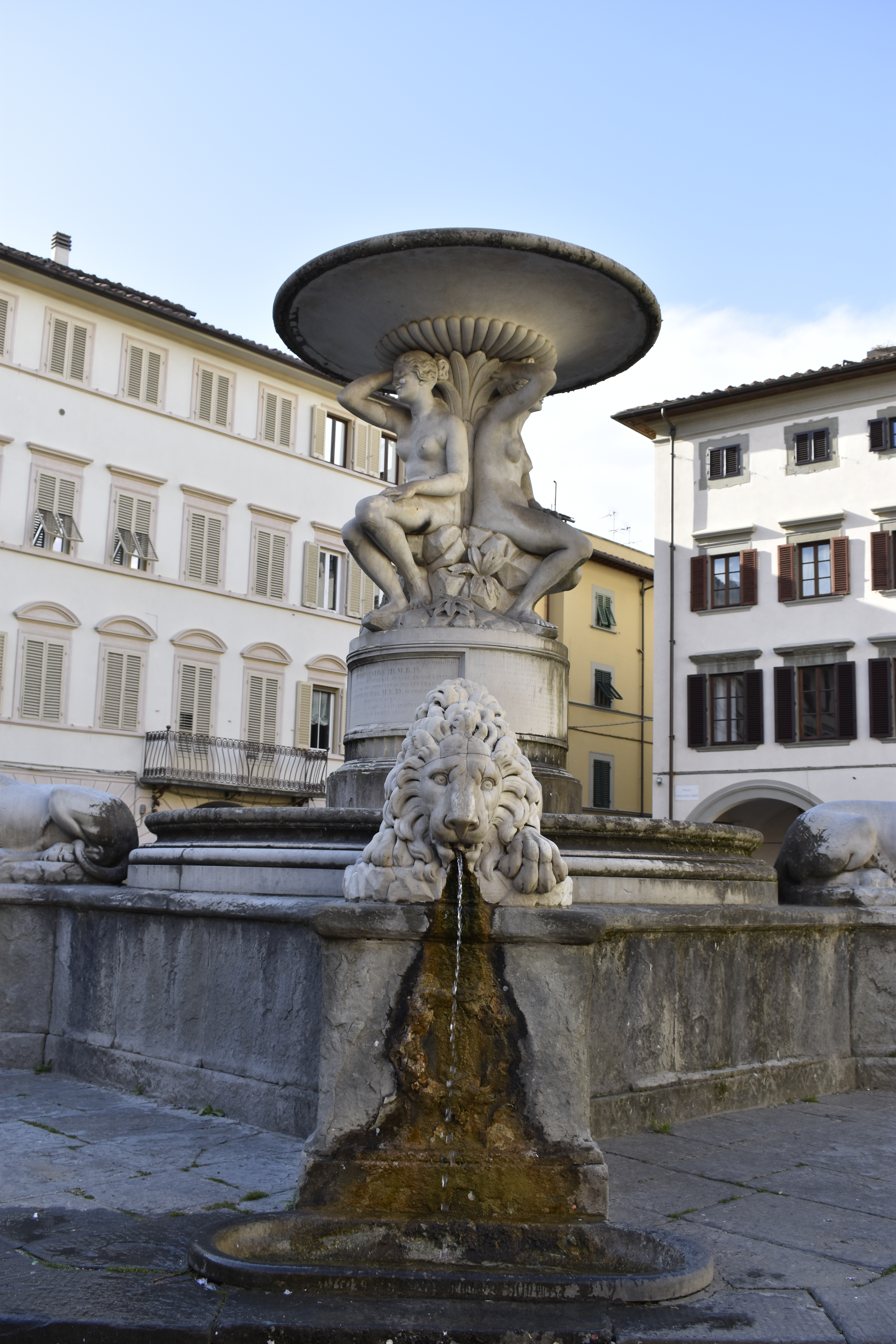 Fontana delle Naiadi o dei Leoni, di Luigi Pampaloni, Luigi ed Ottavio Giovannozzi (1828), situata in Piazza Farinata degli Uberti a Empoli